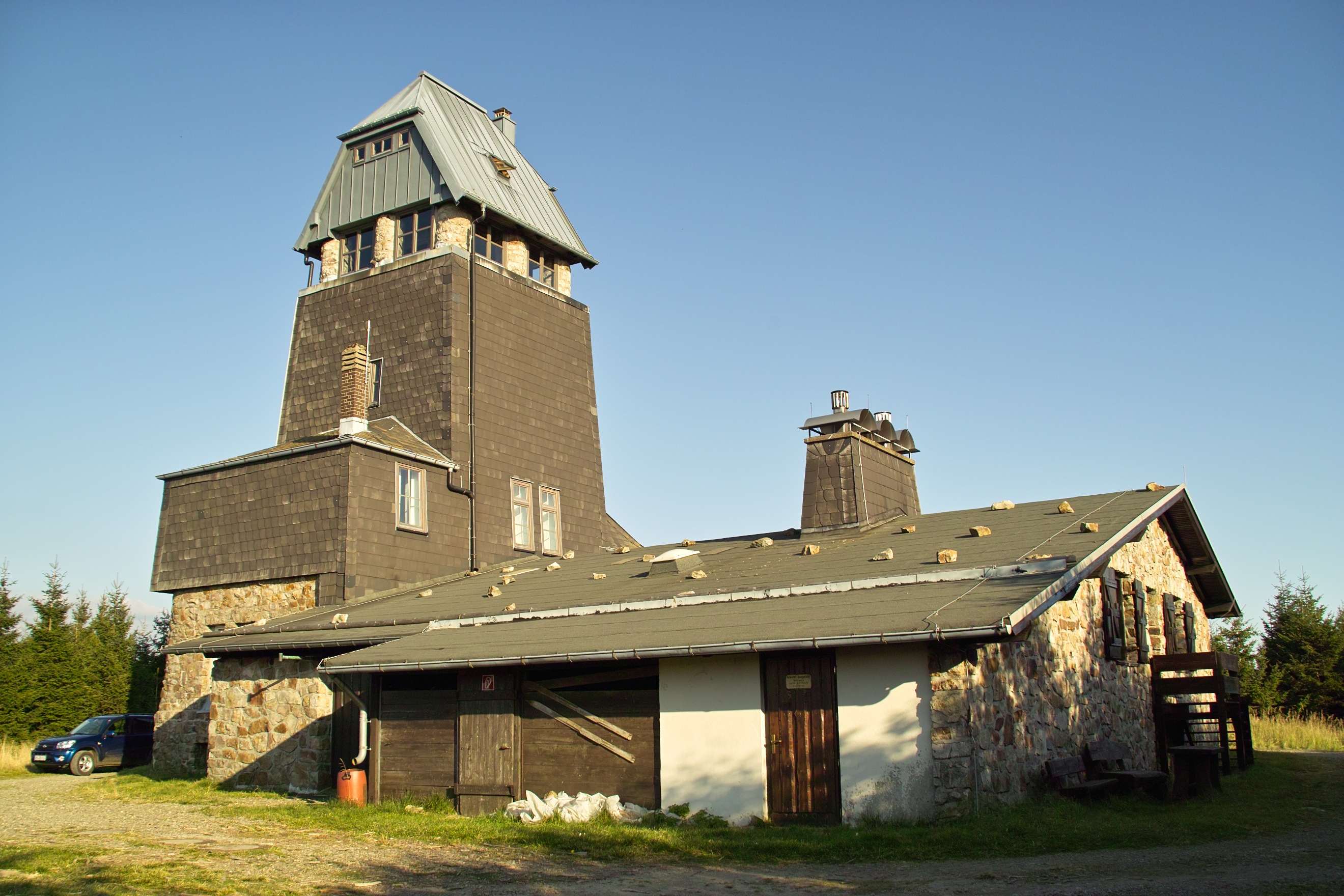 Nordwestseite der Hanskühnenburg